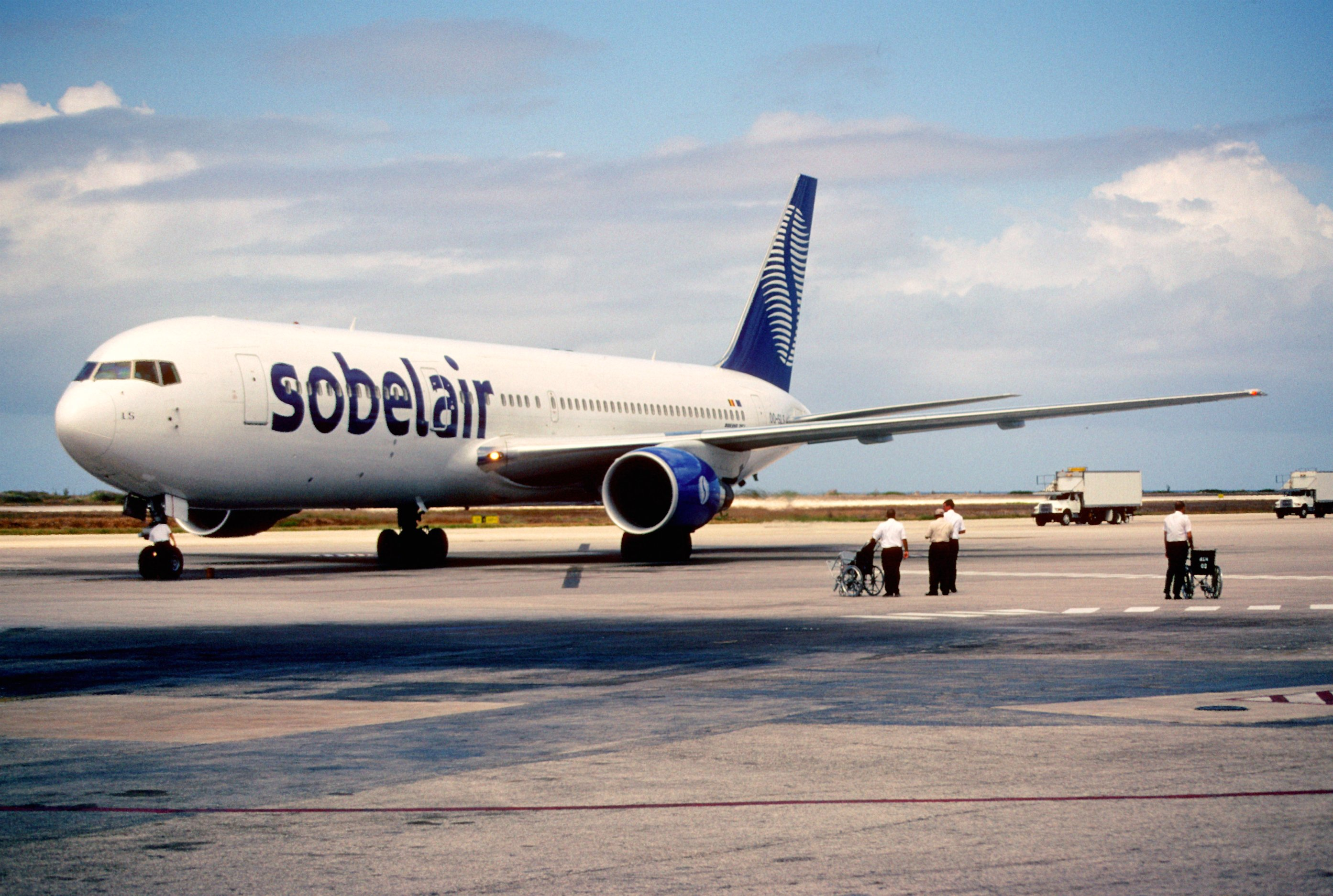 171ad - Sobelair Boeing 767-3BGER; OO-SLS@CUR;12.03.2002